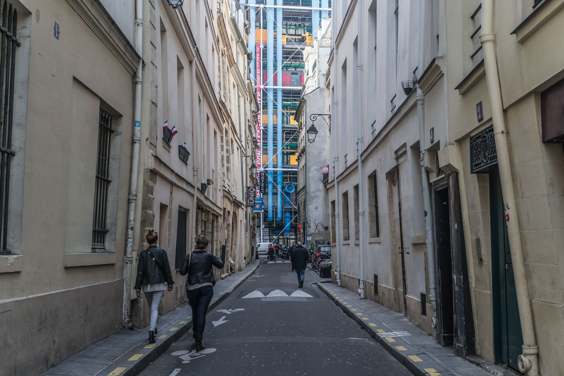 Saint-Merri, 75004 Paris, France